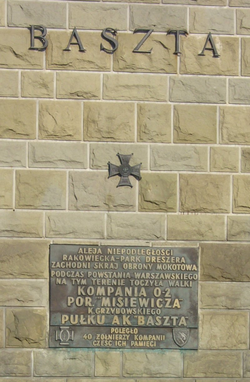 Tablica upamiętniająca walki kompanii O2 pułku Baszta - róg Al. Niepodległości i ul. Racławickiej.